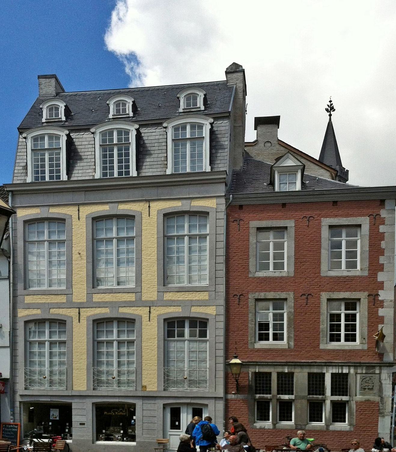 Haus zum Lindenbaum (rechtes Gebäude, Blick vom Hof), Rückseite des Couven-Museums in Aachen